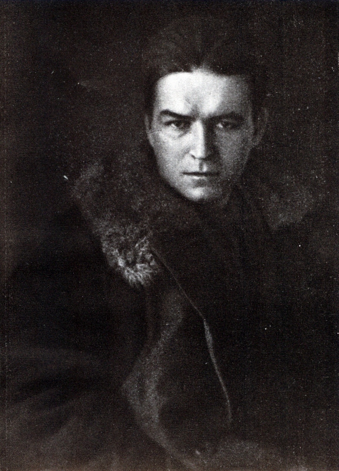 Фотографія 1928 року